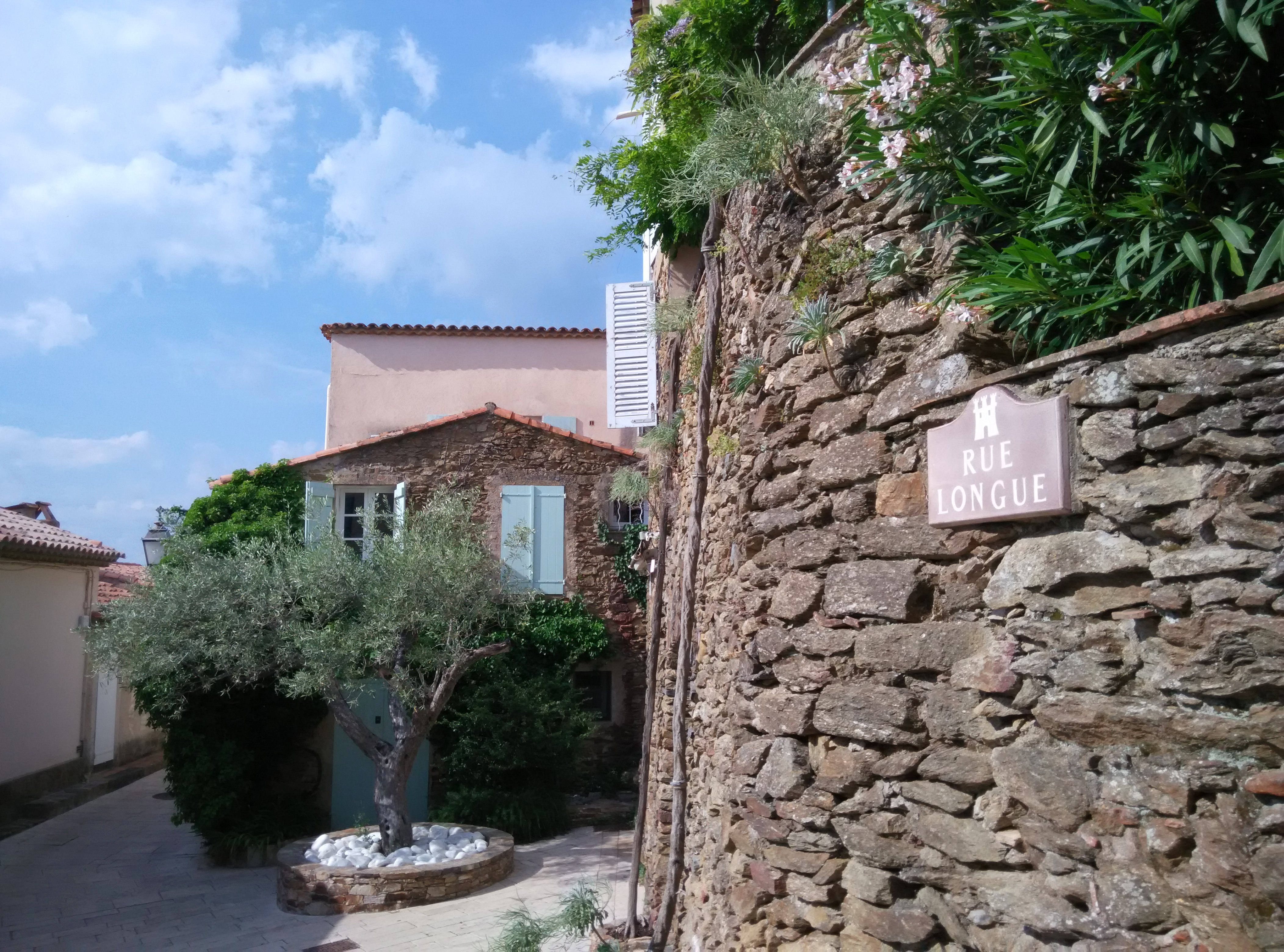 Placette au milieu de la rue Longue de Gassin, avec sur la droite l'arrivée de la montée de la Tubassière